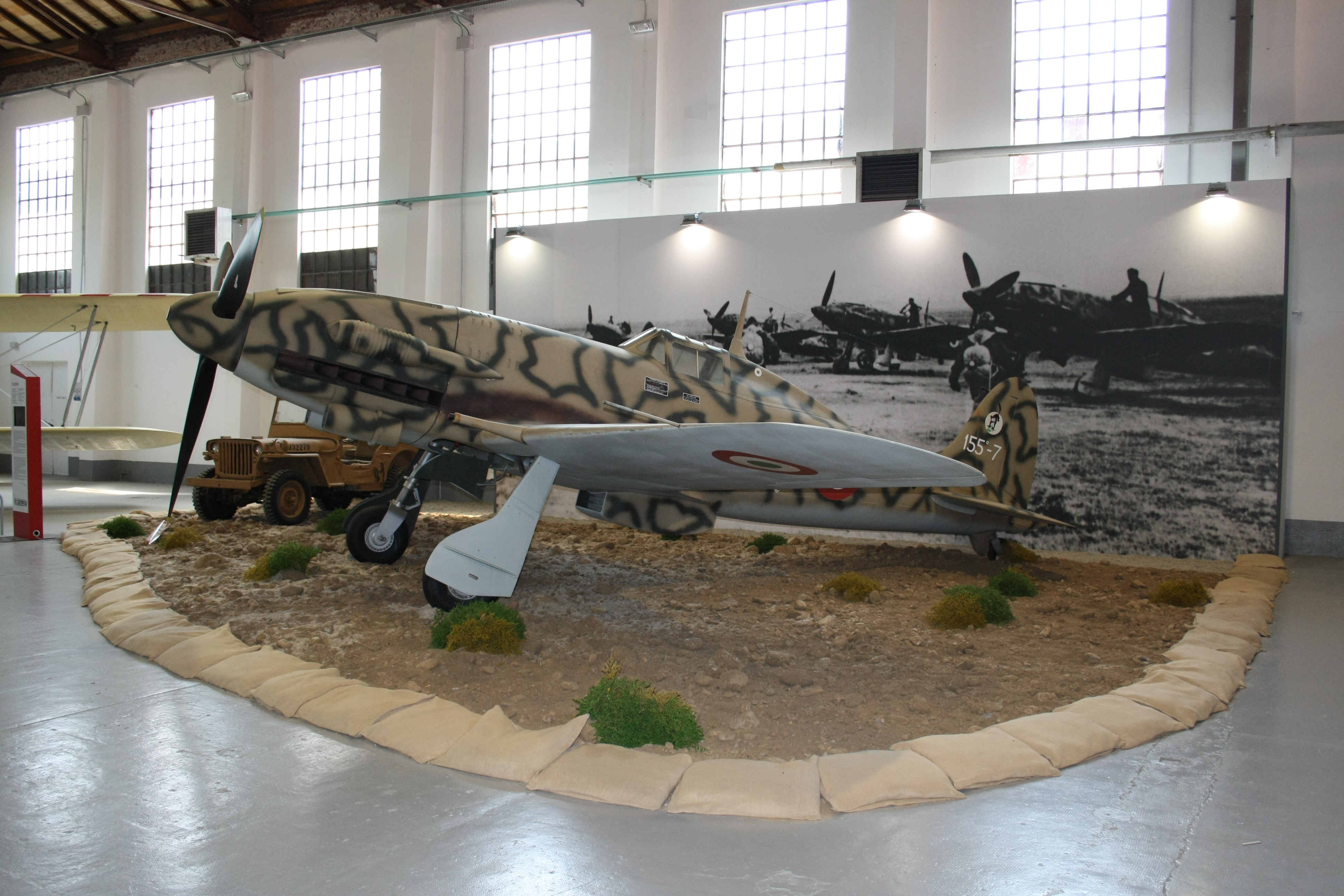 Macchi MC.205 conservato presso il museo del volo "Volandia".